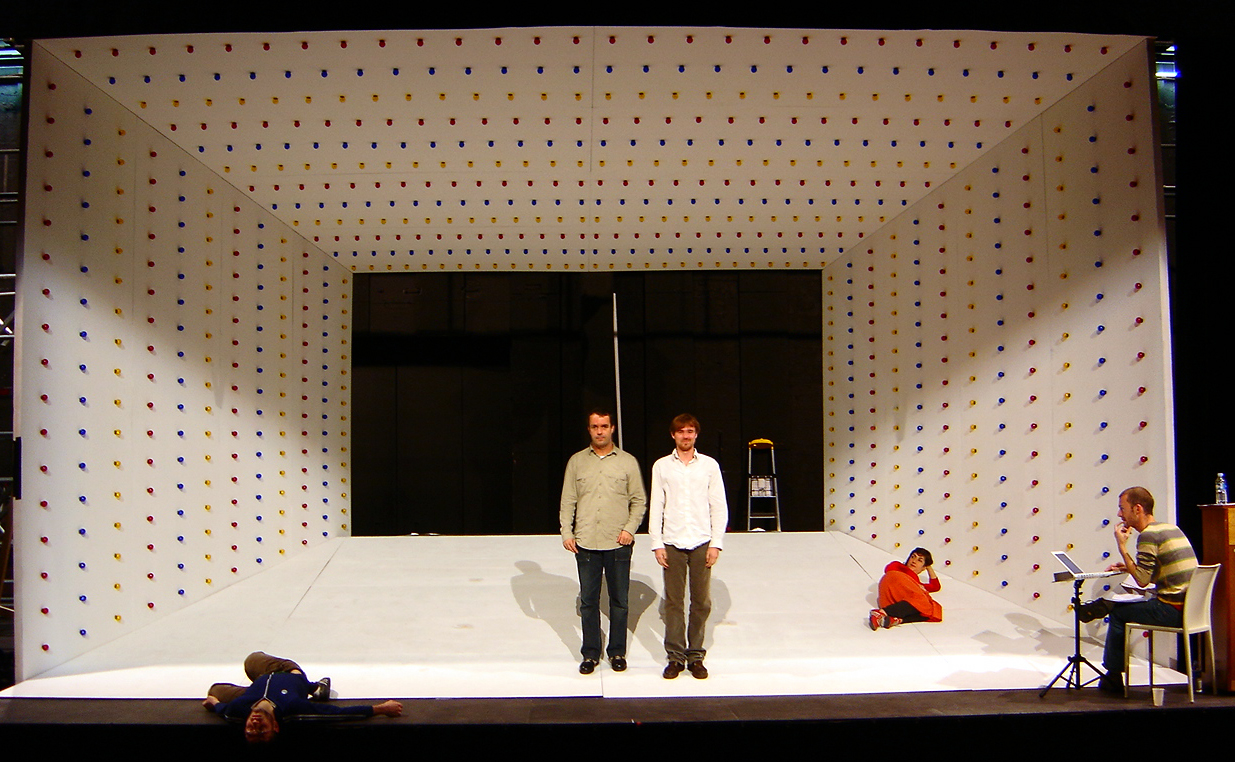 photo de répétition de l'opéra de Antoine Duhamel sur un texte de Jean Cocteau, mise en scène et scénographie de Arnold Pasquier. Avec Ronan Nédélec, Maria Donata D'Urso, Gérald Kurdian, Léandre Bernard-Brunel. Création le 16 novembre 2007 L'Apostrophe, scène nationale Cergy-Pontoise.